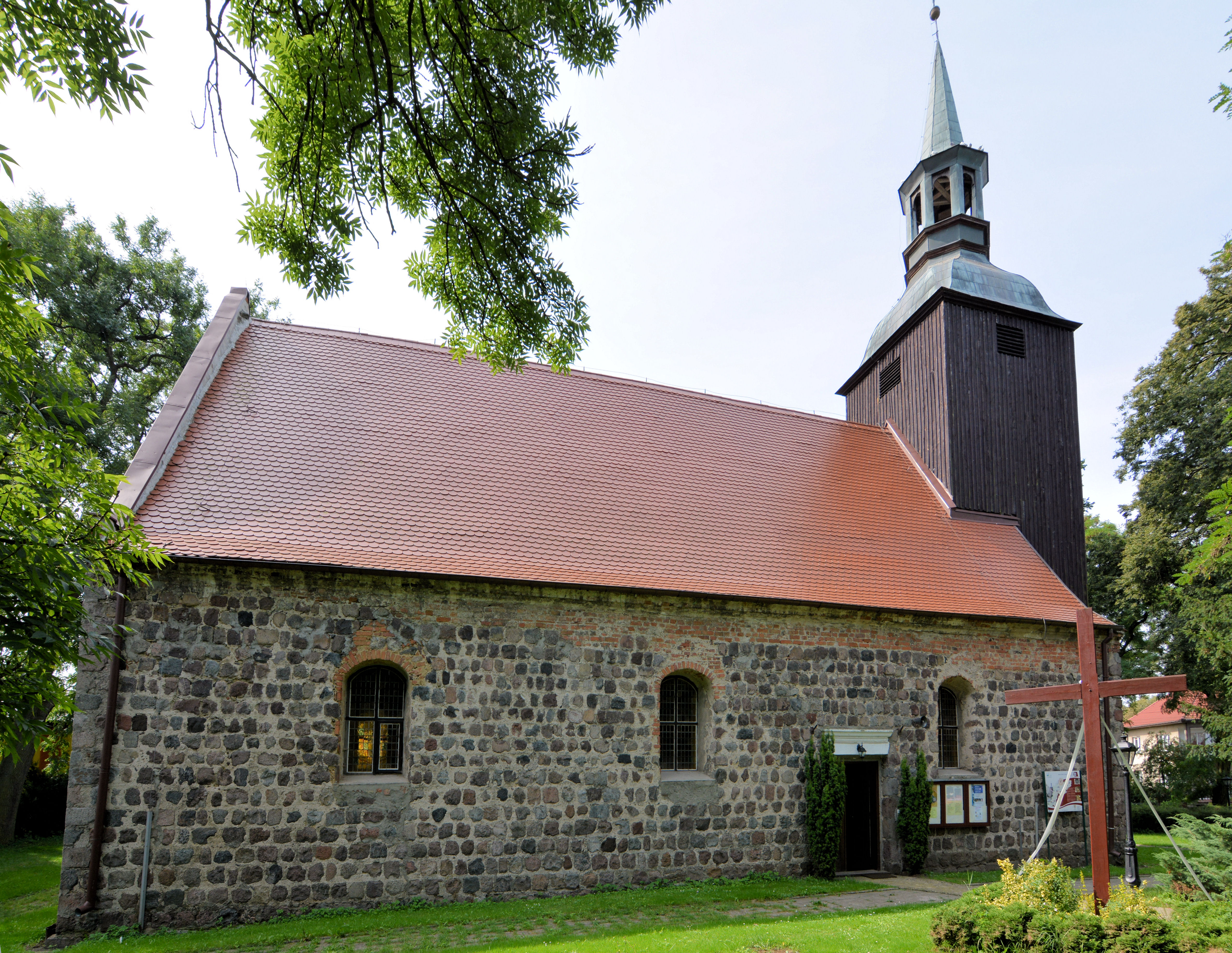 Kościół w Przelewicach